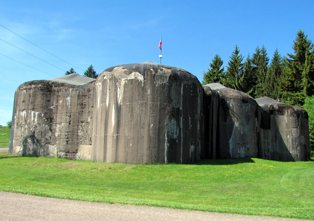 Babí-Stachelberg